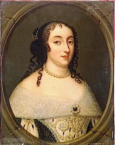 Portrait de la duchesse de Villeroy copié à partir d'une oeuvre originale par Auguste de Creuse, conservé au Château de Versailles.